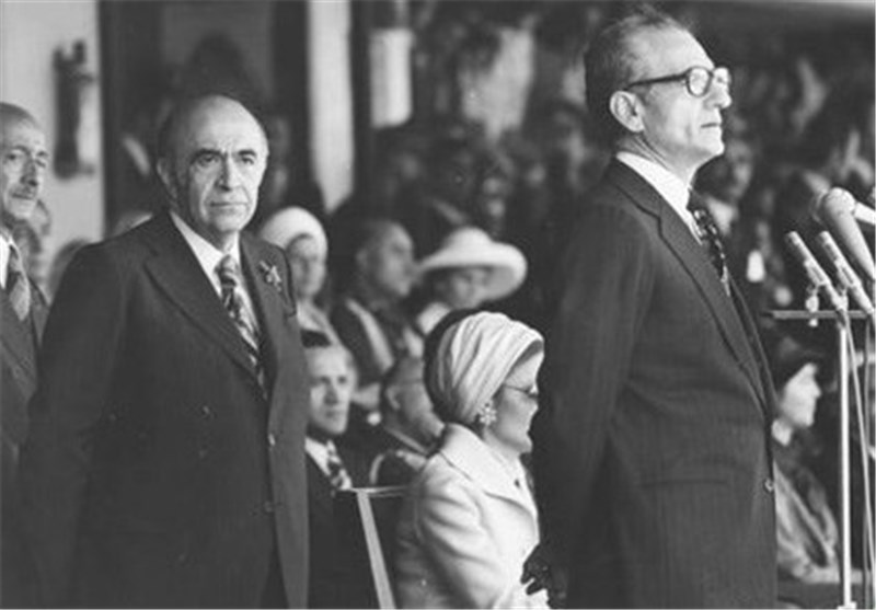 محمدرضا پهلوی و امیرعباس هویدا